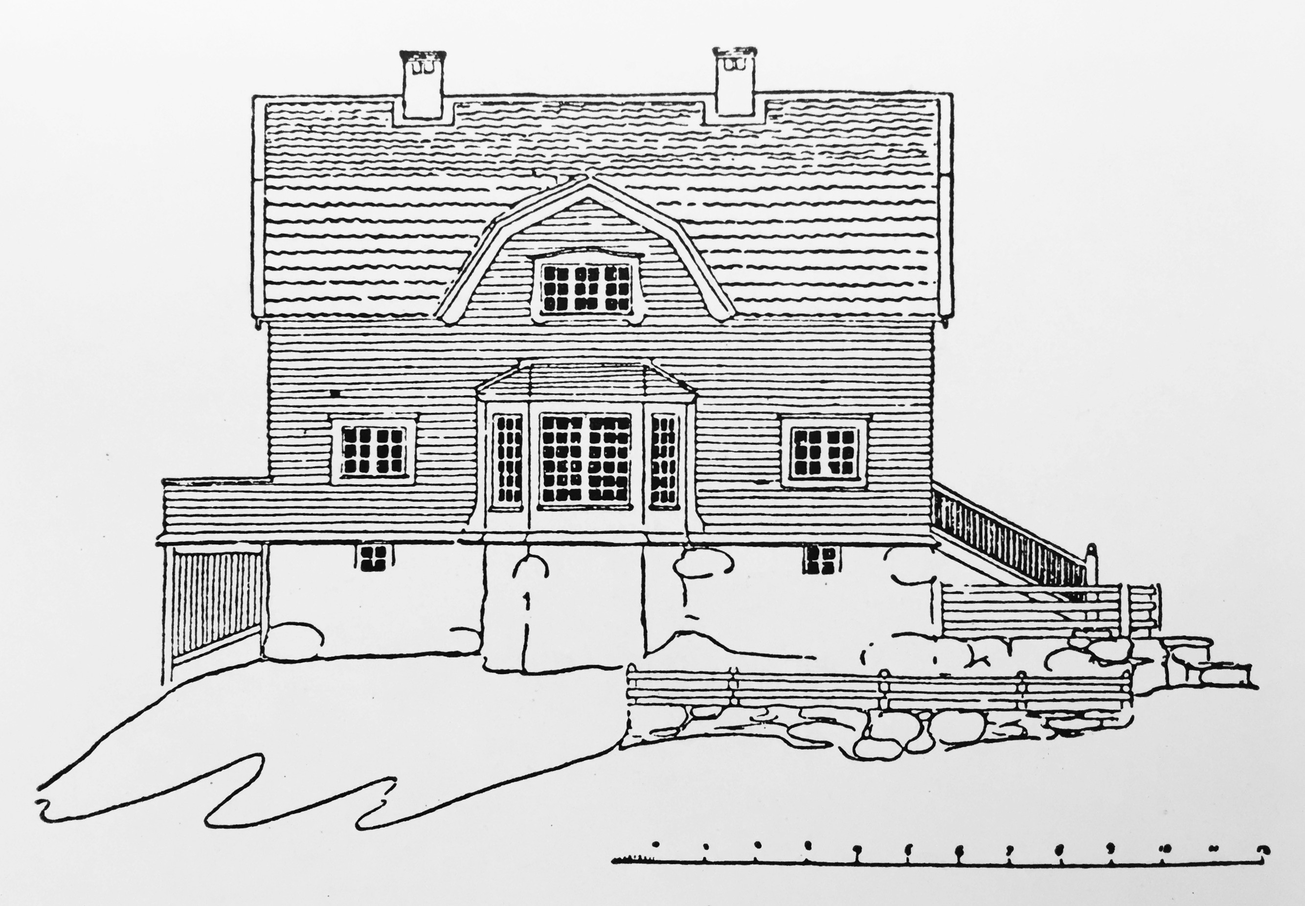 Tammska villan - fasader. Arkitekt Carl Westman. Byggherre Percy Tamm, byggd 1903, Ringvägen 37